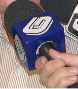 Detalhe de um microfone da emissora brasileira Rede Gazeta